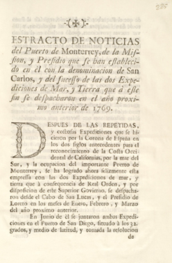 [PORTOLÁ, Gaspar de (attrib.) (1723-1784)]. Estracto de noticias del puerto de Monterrey, de la missión, y presidio que se han establecido en el con la denominación de San Carlos, y del sucesso de las dos expediciones de mar, y tierra que a este fin se despacharon en el año proximo anterior de 1769 [caption title]. [Colophon: Mexico, August 16, 1770].